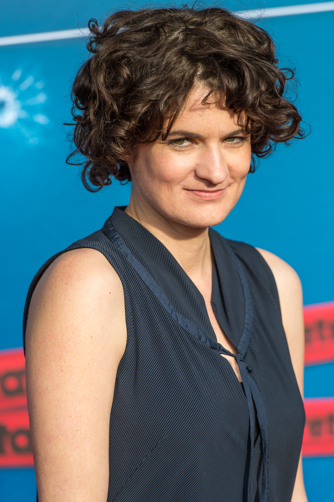 Cinecitta,Der Himmel ist ein Platz auf Erden,Eli Wasserscheid,Elisabeth Wasserscheid,Premiere Franken-Tatort,Schauspielerin,Tatort